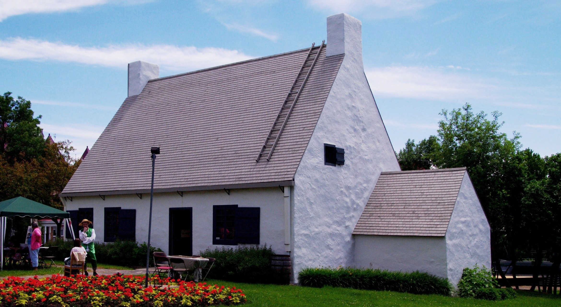 La Maison Girardin, une maison construite dans les années 1760 par Charles Vallée. La maison est est classée monument historique par le gouvernement du Qubébec en 1977. Elle est situé au 600 rue Royale, dans le Vieux-Beauport, à Québec.